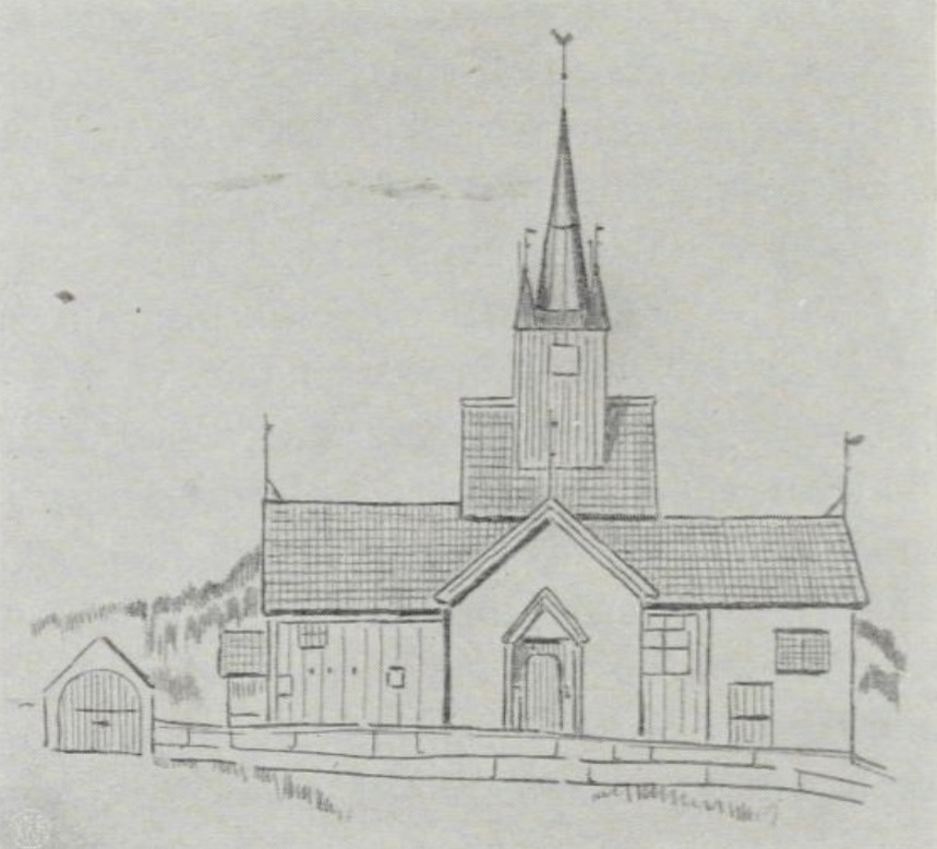 Holmen gamle kirke, Prestfoss, tegnet av prestedatteren Kaja Stub i 1845, gjengitt i «Sigdal og Heggedal: Historisk beretning» (Sigdal og Eggedal historielag, 1974), s. 116. Kirken ble revet i 1855.